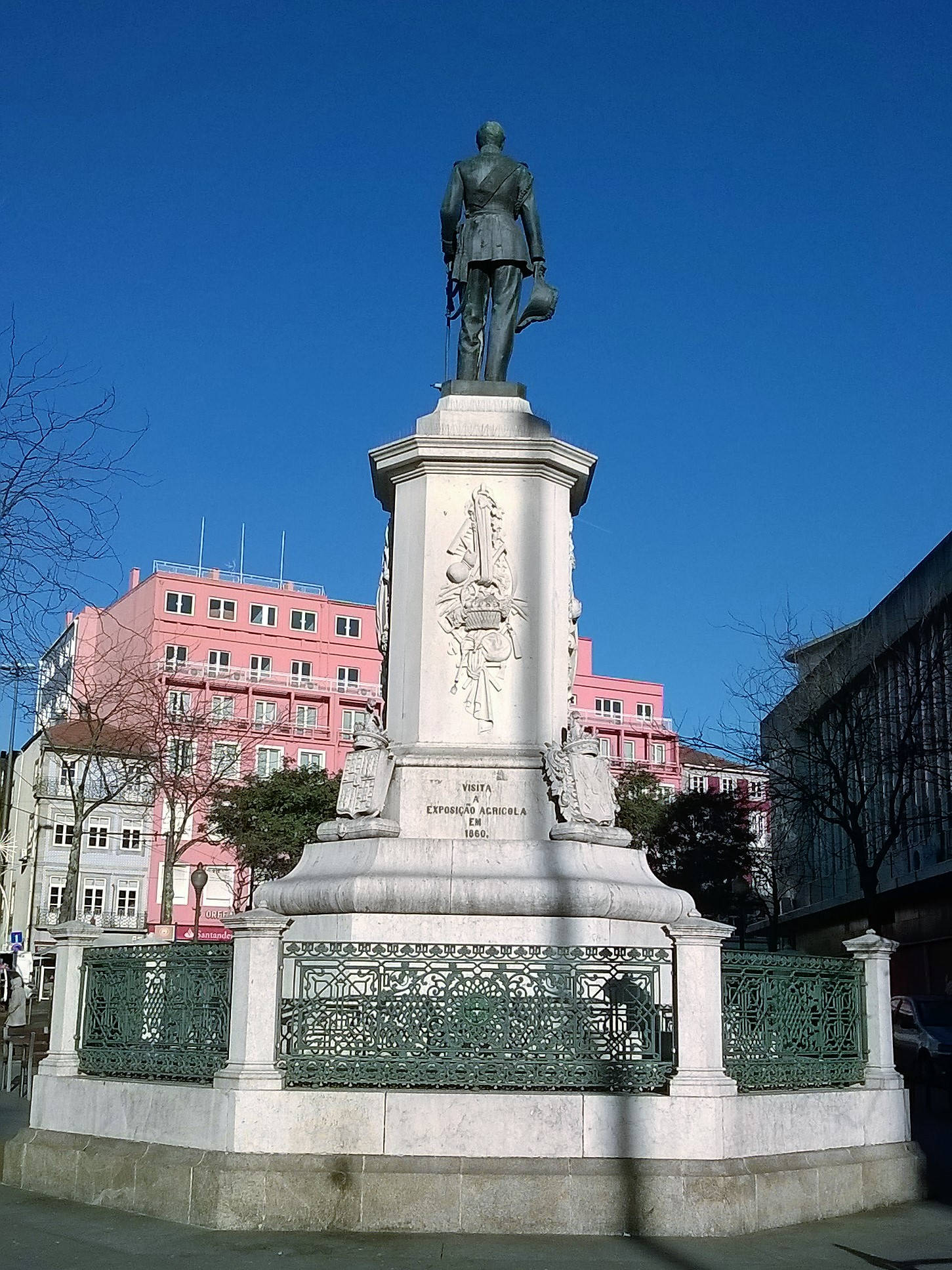 Monumento a D. Pedro V, Largo da Batalha, freguesia de Santo Ildefonso, concelho e distrito do Porto, Portugal: vista de costas.